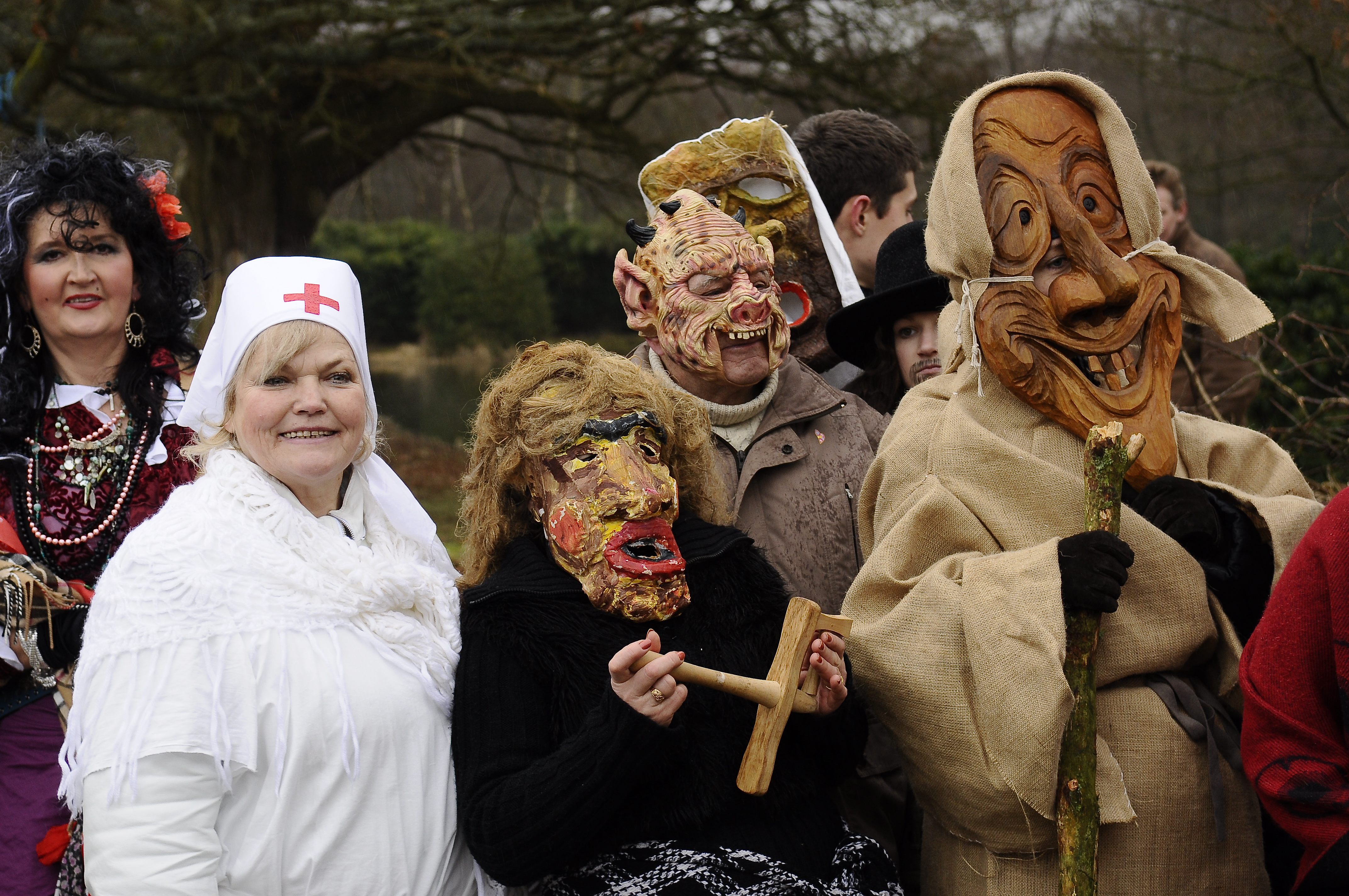 Uzgavenes Lietuviu sodyboj 2010